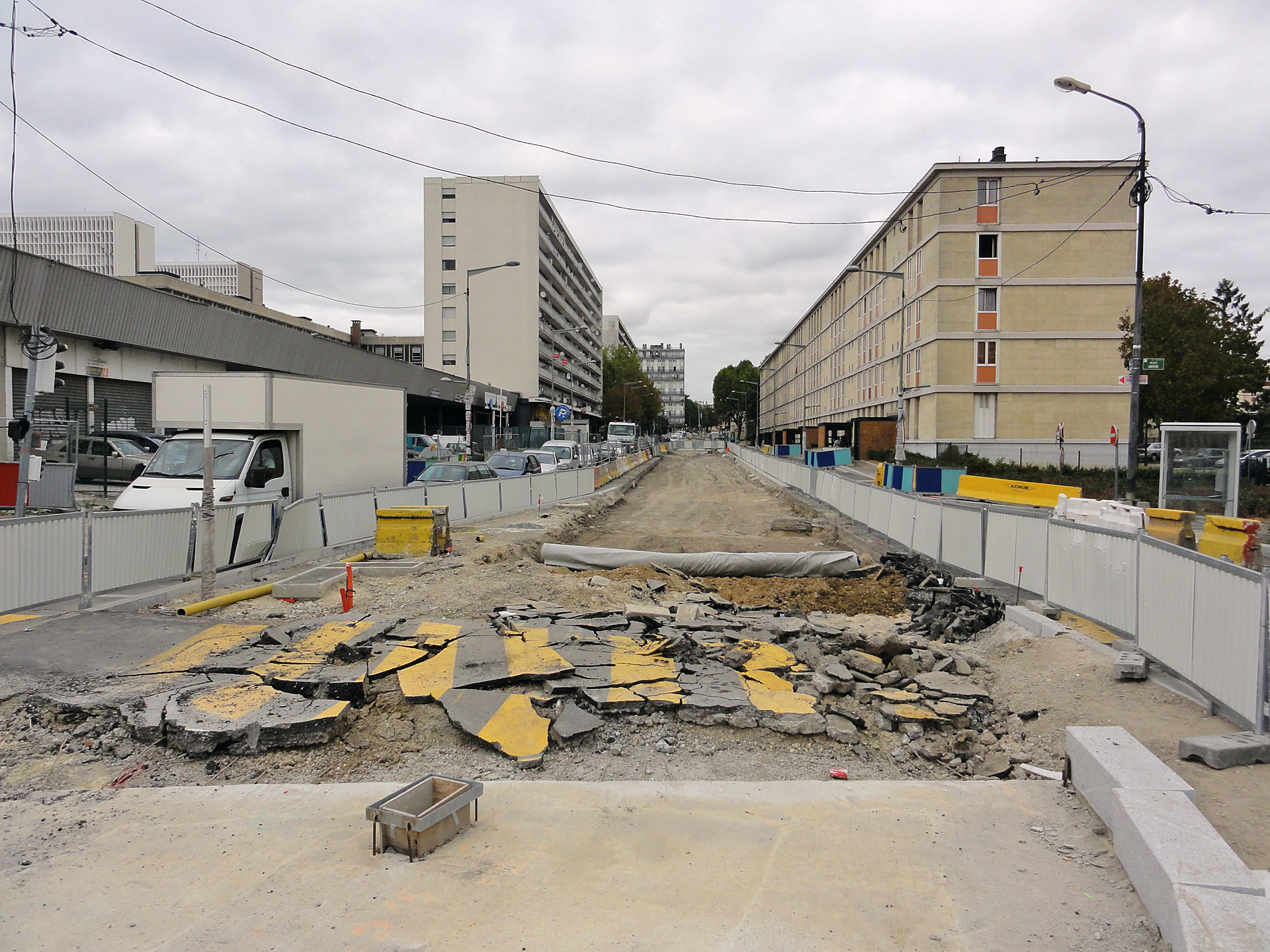 Travaux du T5, boulevard Edouard-Branly à Sarcelles, France.